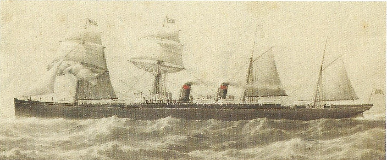 Die 1879 bei John Elder & Co. Ltd., Glasgow, gebaute Arizona war der erste Schnelldampfer.